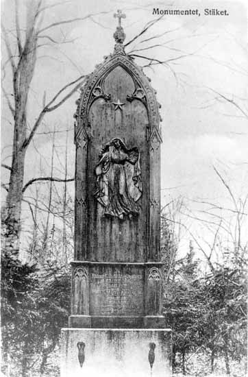 Almare-Stäkets herrgård i Uppland-Bro kommun. Monumentet på monumentsholmen rests till minne för Helena Charlotta Åkerhielm, dotter till Samuel af Ugglas (1786-1828) år 1834 av hennes make Gustaf Fredrik Åkerhielm (1776-1853). Han var friherre, militär och teaterchef för Dramaten i Stockholm. Helena Charlotta Åkerhielm avled 1828. Hon var grevinna, dramatiker och översättare. Foto från 1920-talet.